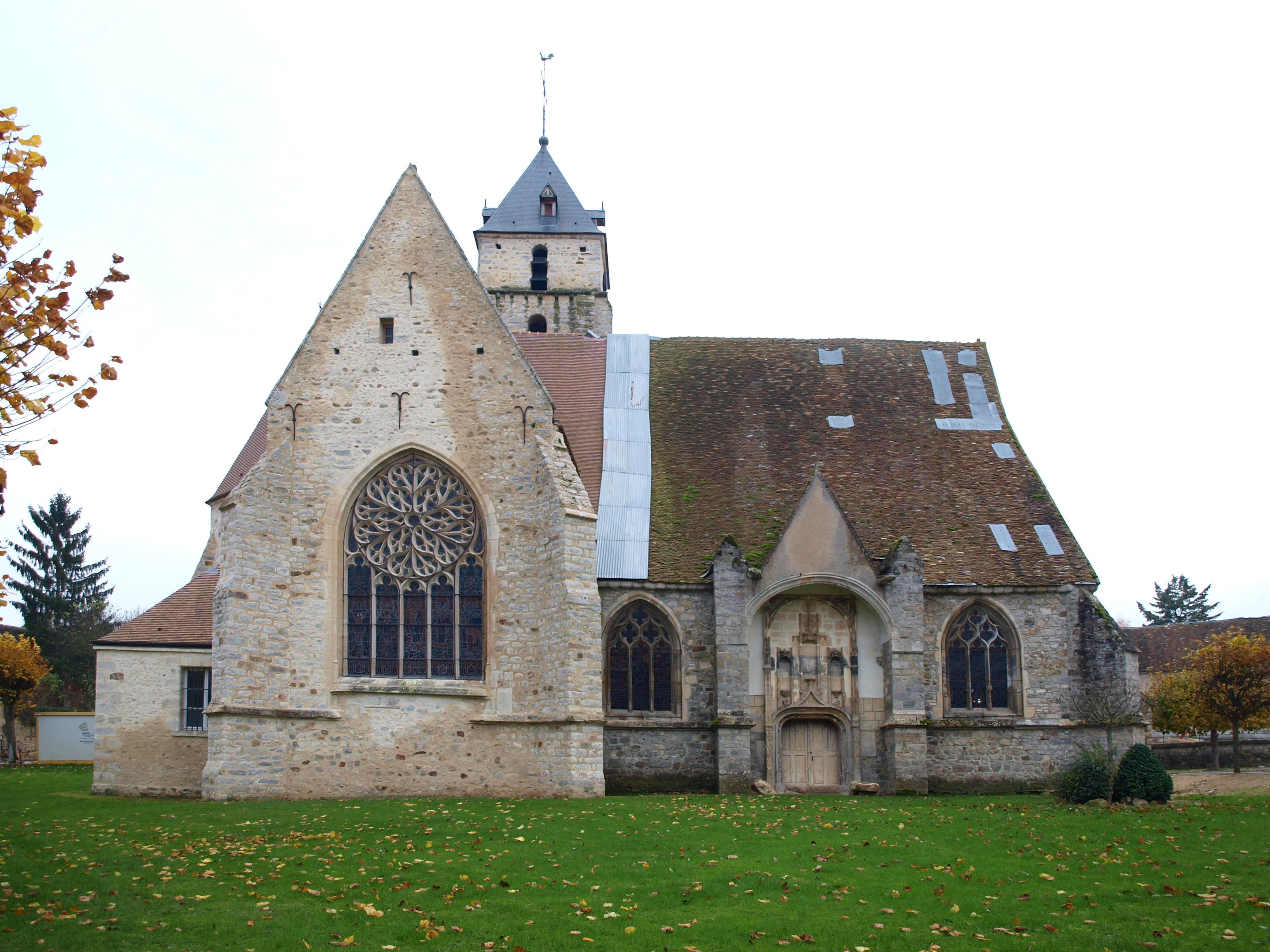 Église Saint-Martin de Champigny (Yonne, France), vue extérieure.